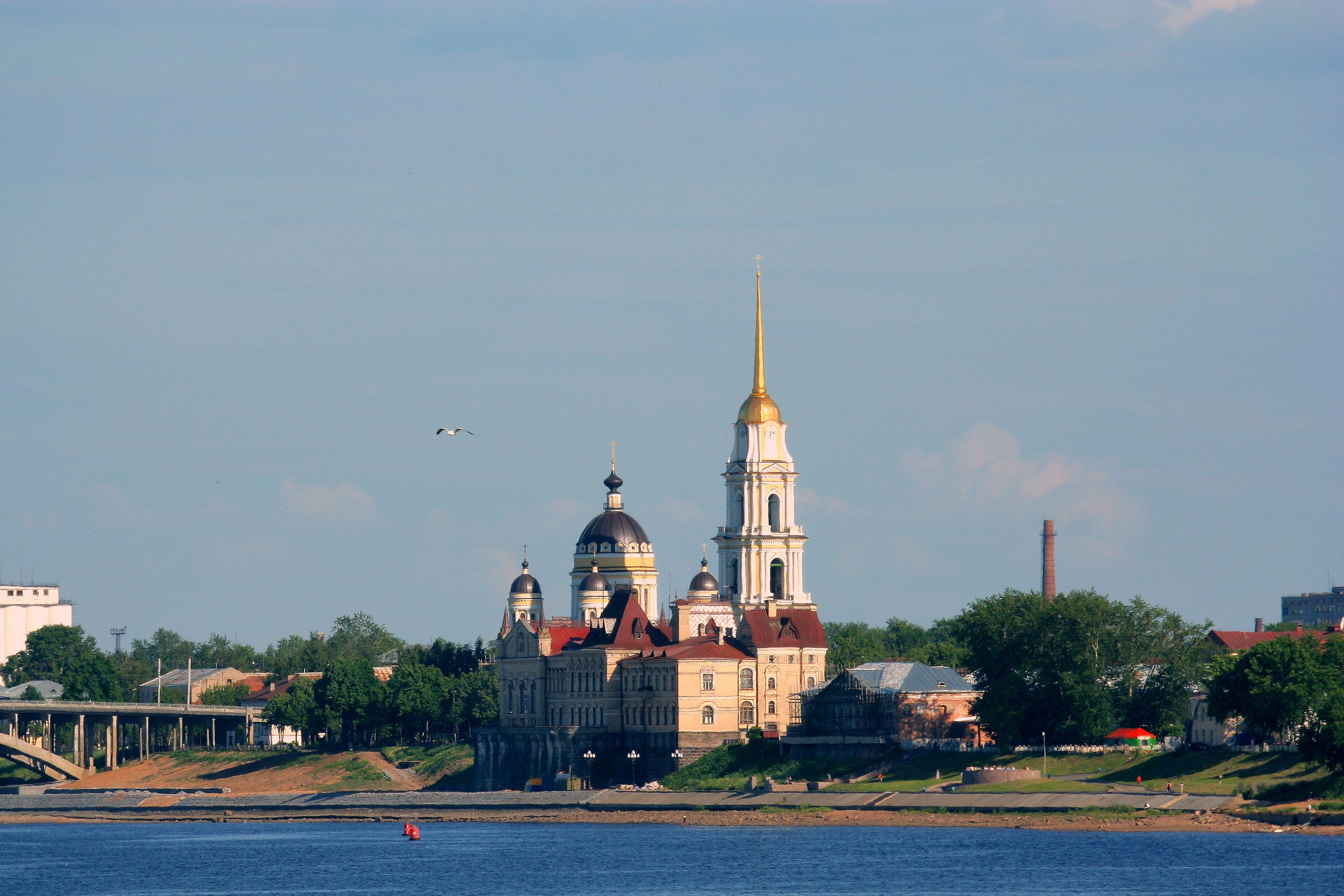 Rybinsk